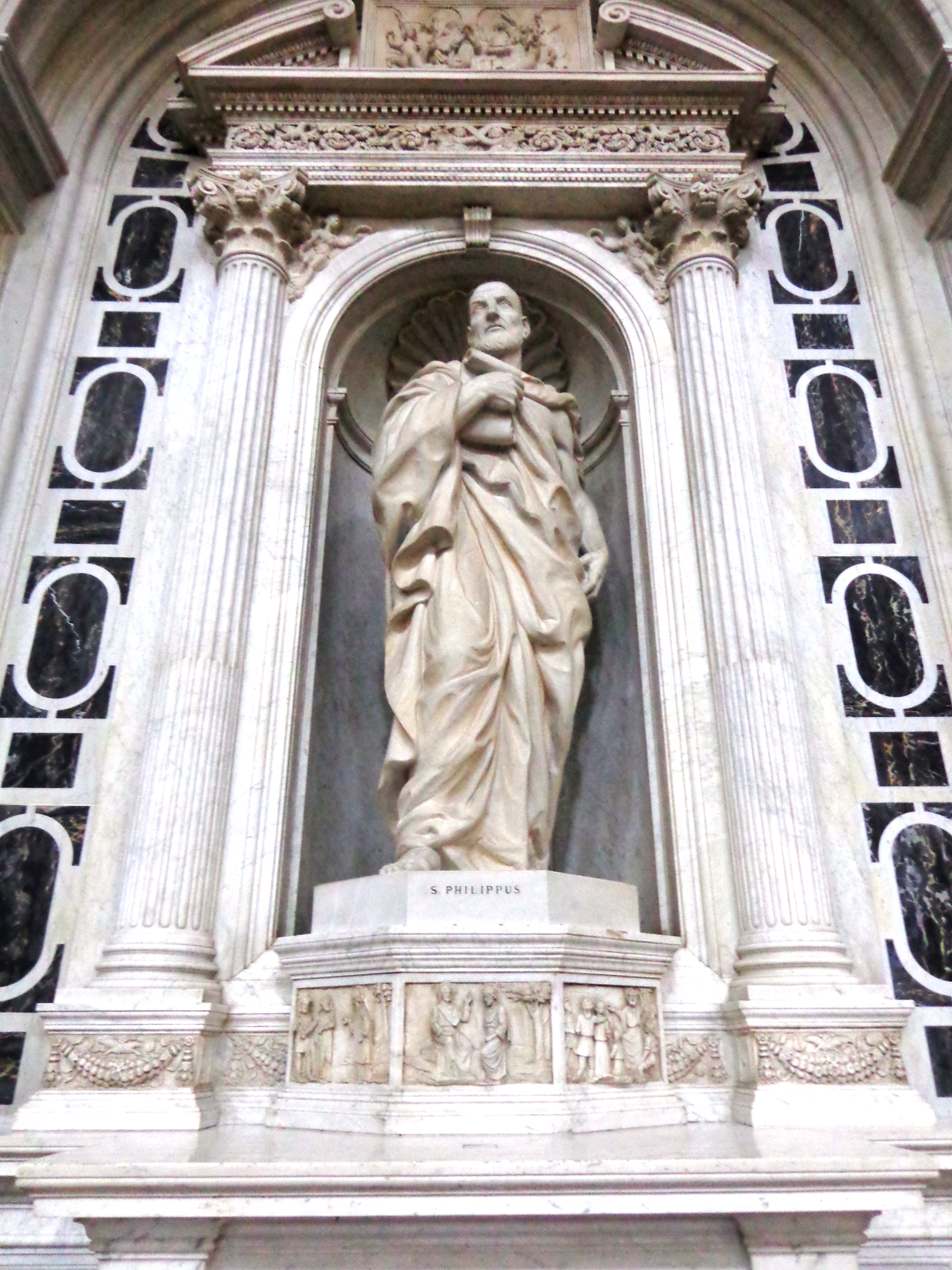 Duomo_ME_14